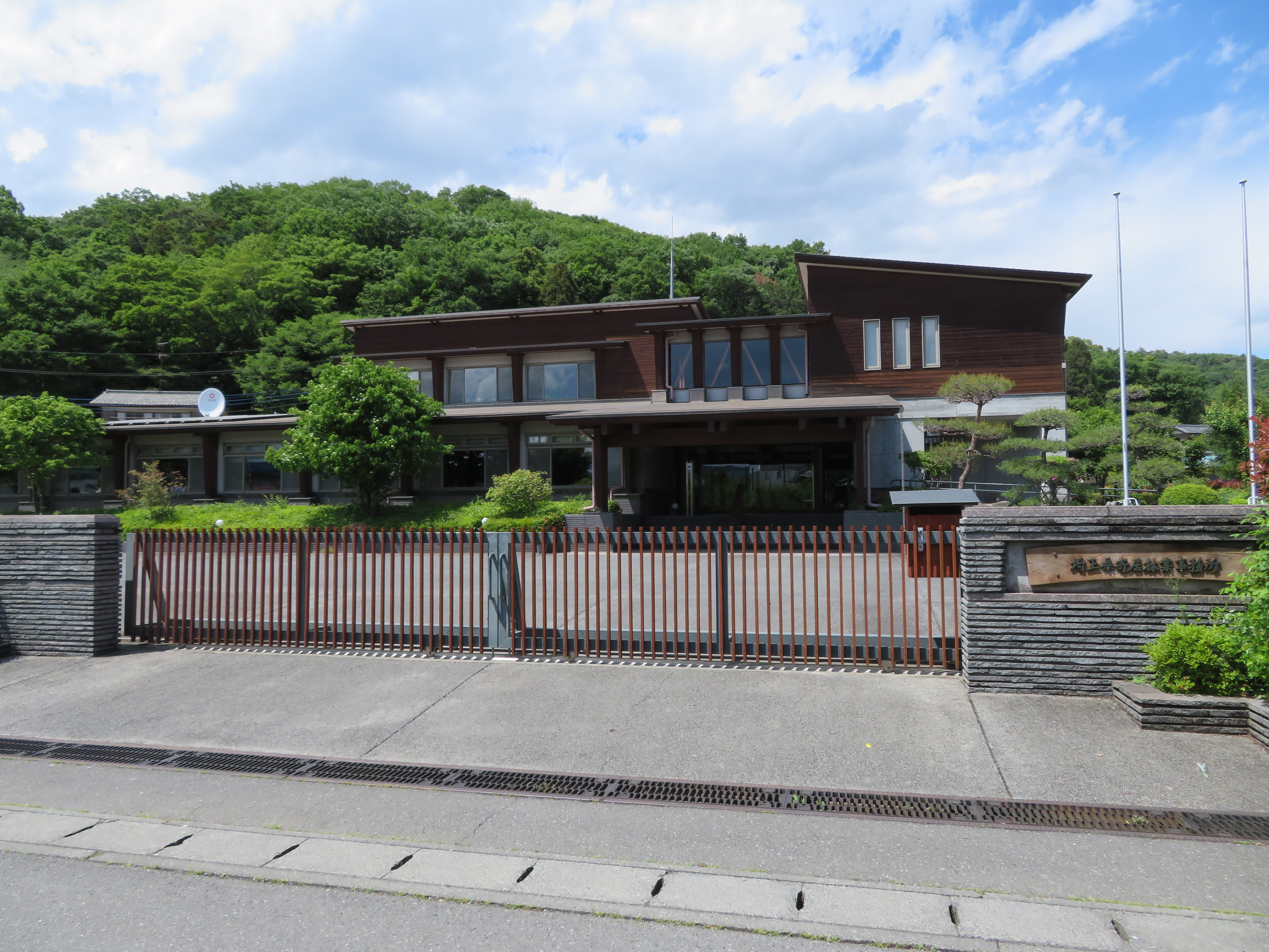 埼玉県寄居林業事務所庁舎 Canon PowerShot SX720 HS